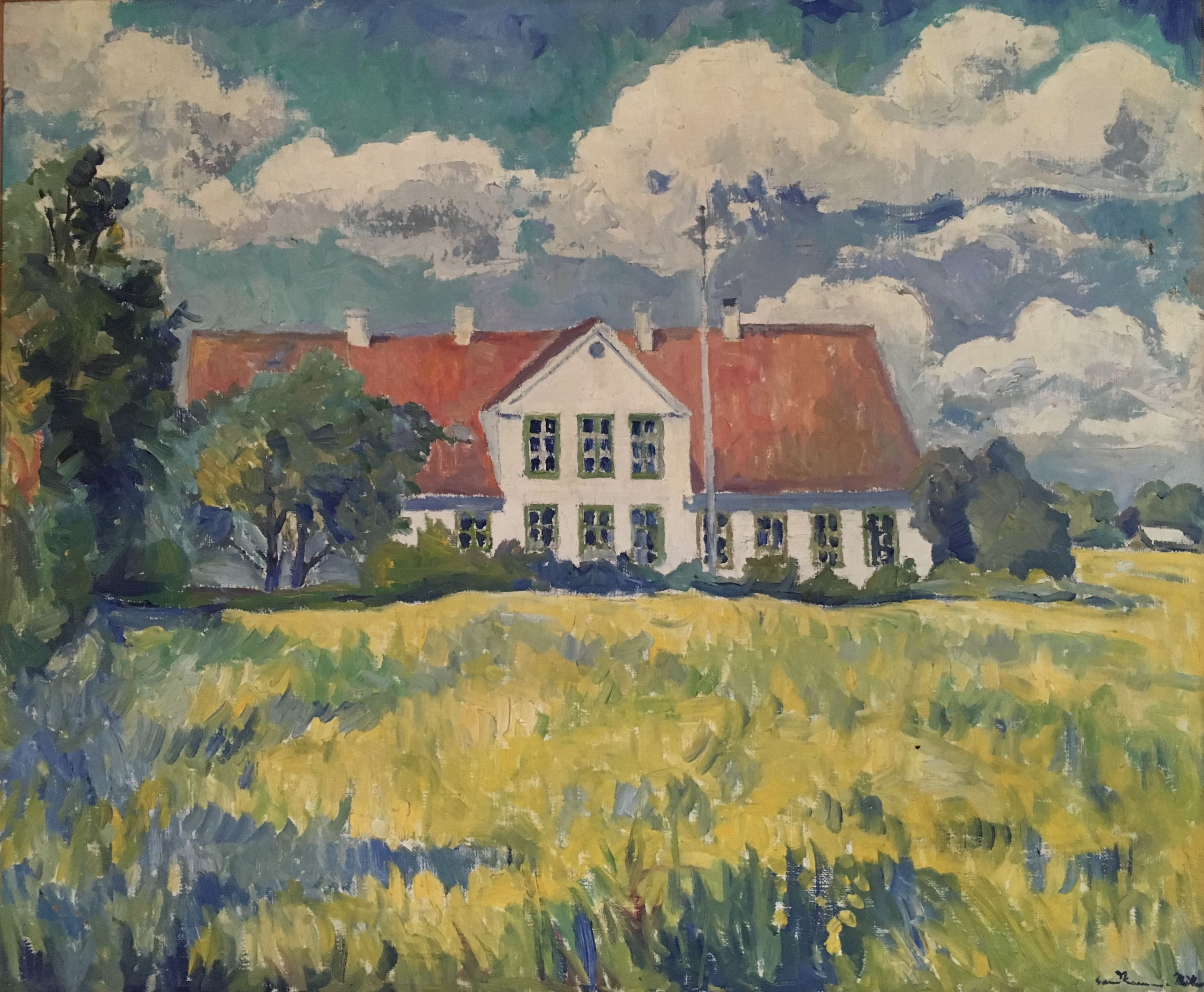 Ölgemälde, Bauernhaus auf Alsen. Undatiert, vermutlich entstanden zwischen 1940 und 1950.